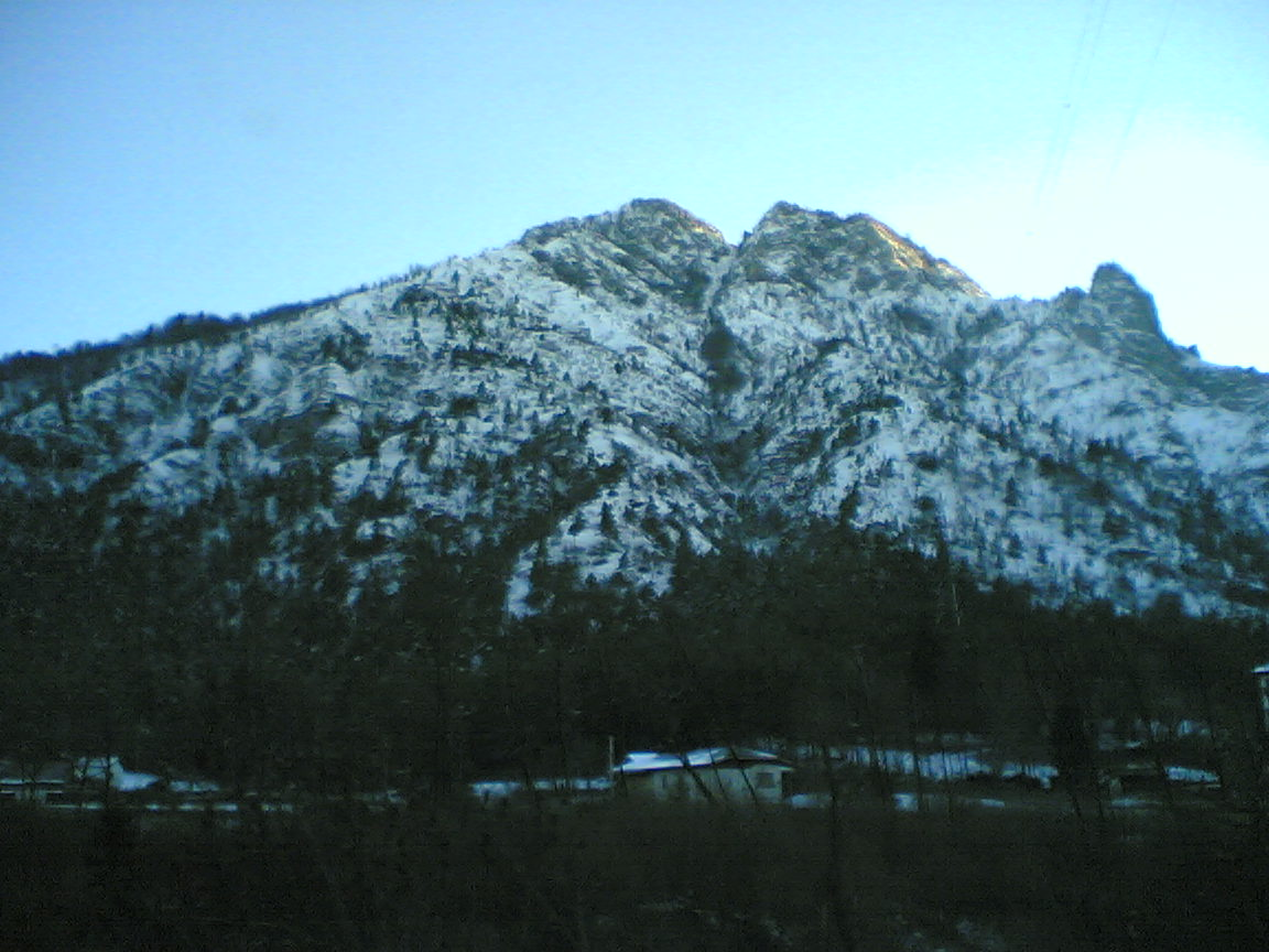 Corno Guazza